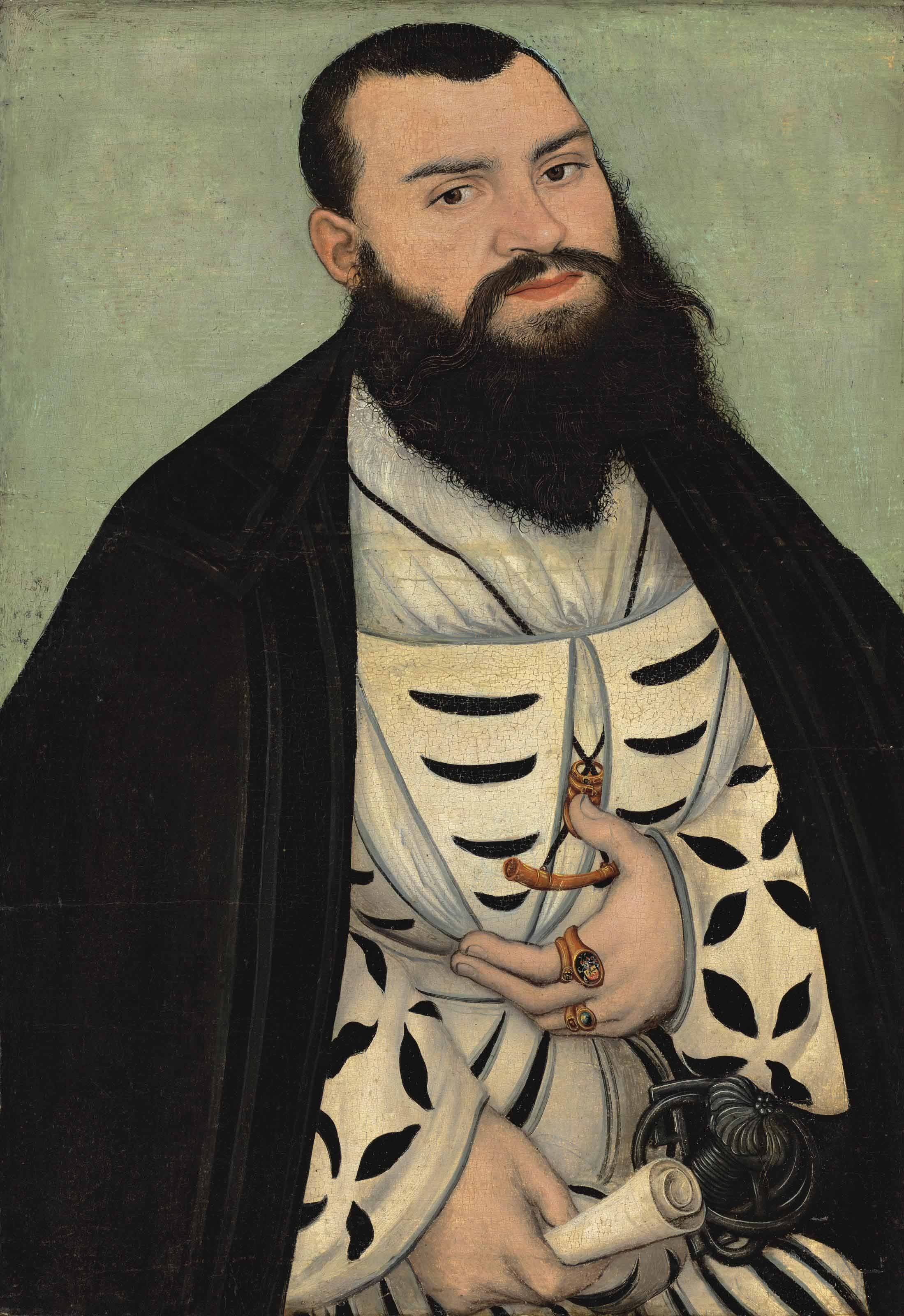 Dr. Johann Scheiring (1505-1555). Der Wappenring des Dargestellten zeigt das Familienwappen der Scheirings.